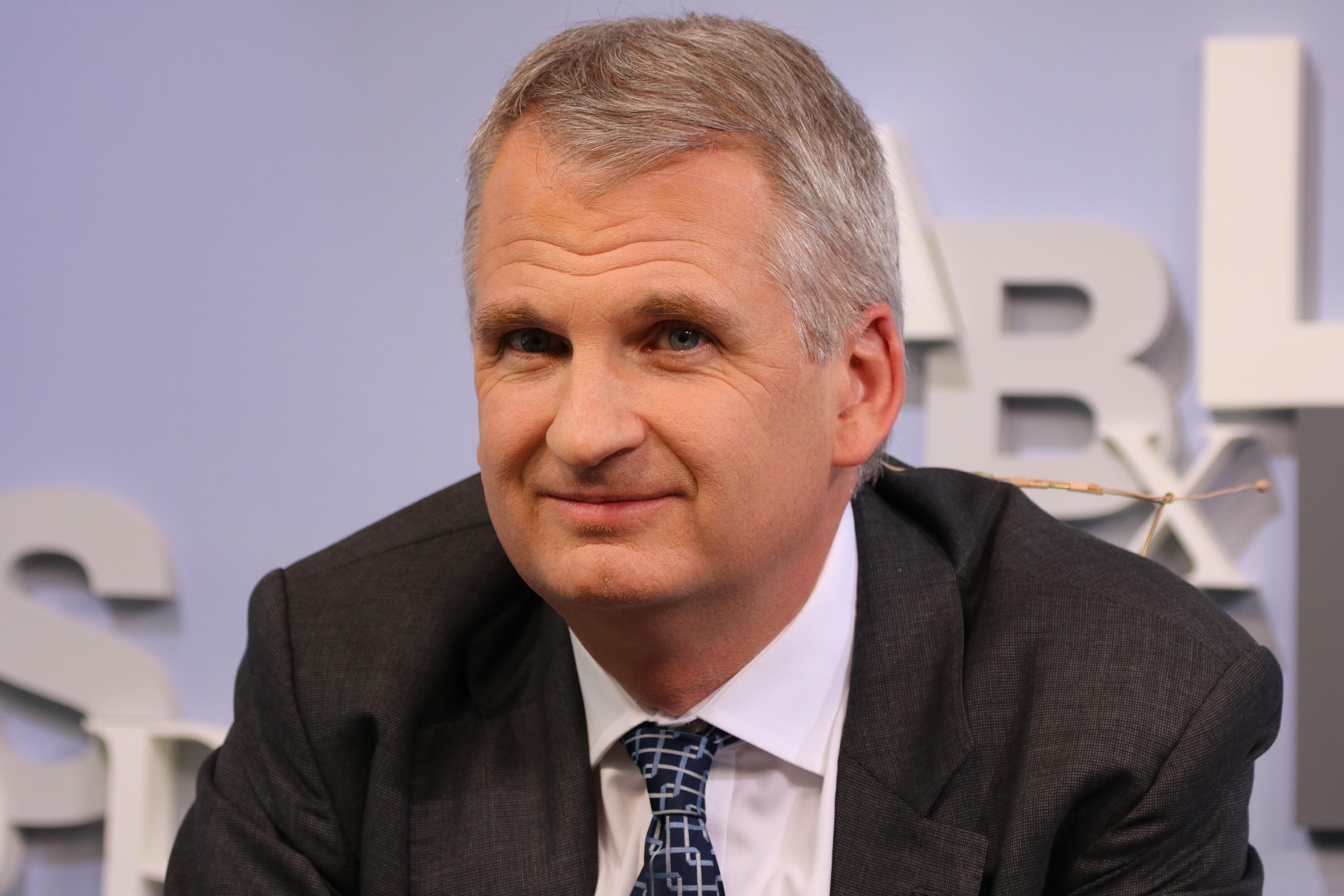 auf der am 17. Oktober 2015